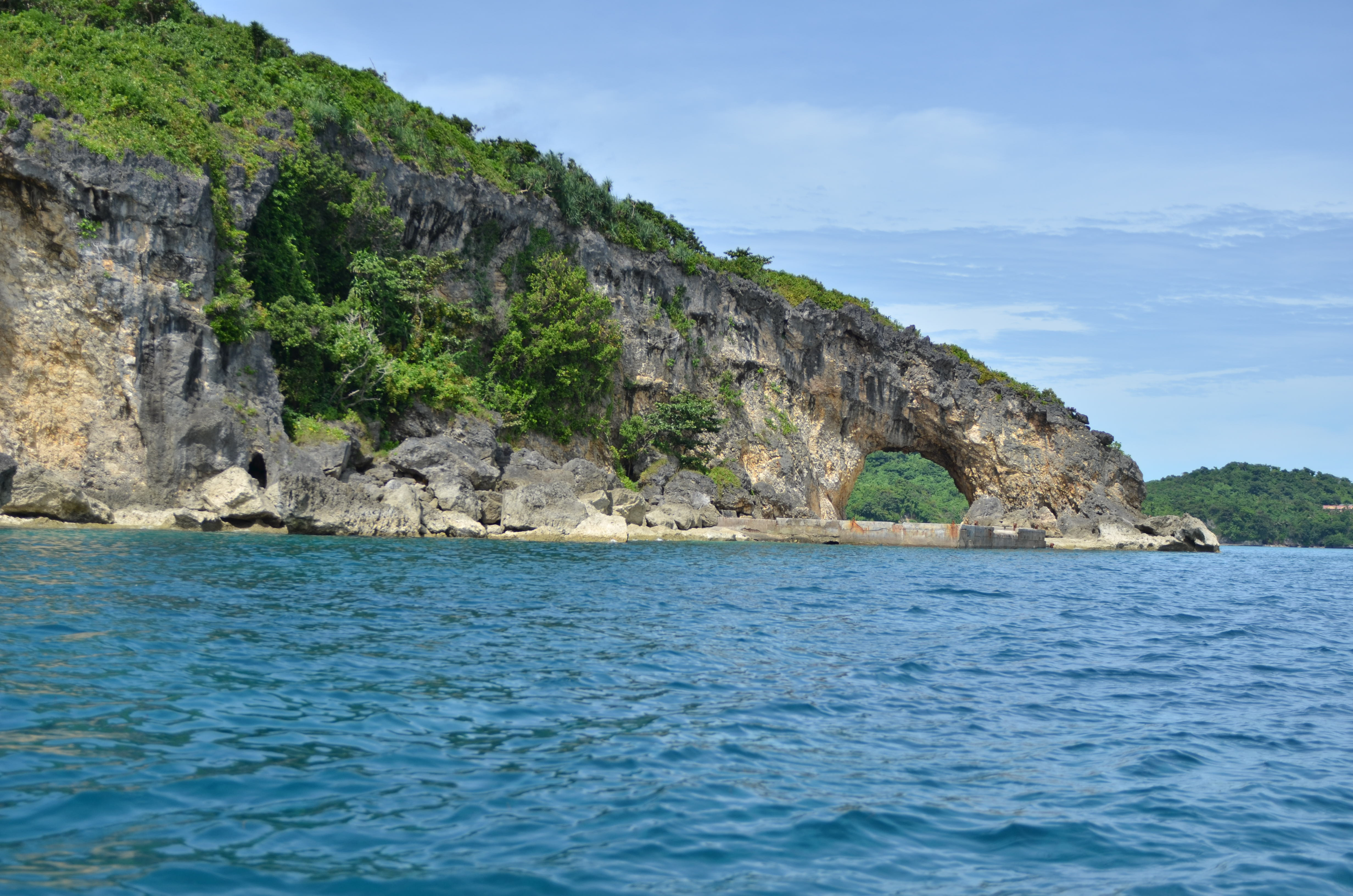 Boracay